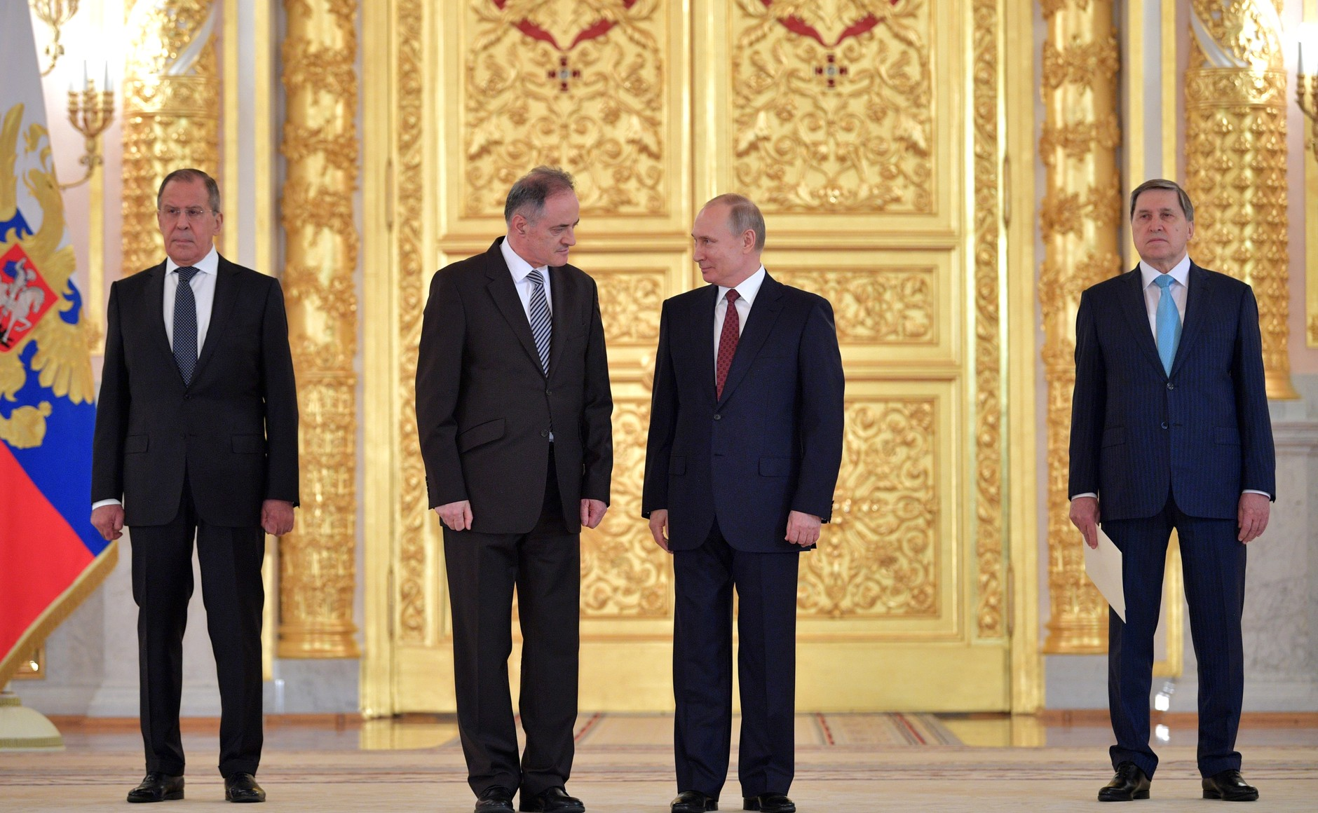 В Александровском зале Большого Кремлёвского дворца Владимир Путин принял верительные грамоты у послов ряда иностранных государств. На церемонии вручения верительных грамот. С Чрезвычайным и Полномочным Послом Черногории в Российской Федерации Рамизом Башичем.